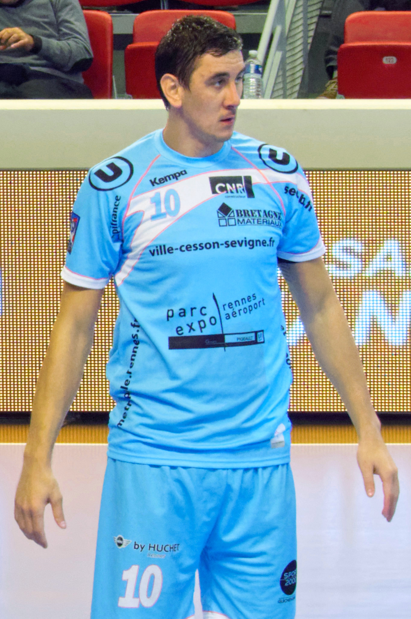 Match de championnat de LNH entre le PSG Handball et Cesson-Rennes. A Coubertin, le 24 septembre 2014.